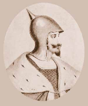 Изображение князя Изяслава Мстиславовича Киевского, взято из украинской википедии